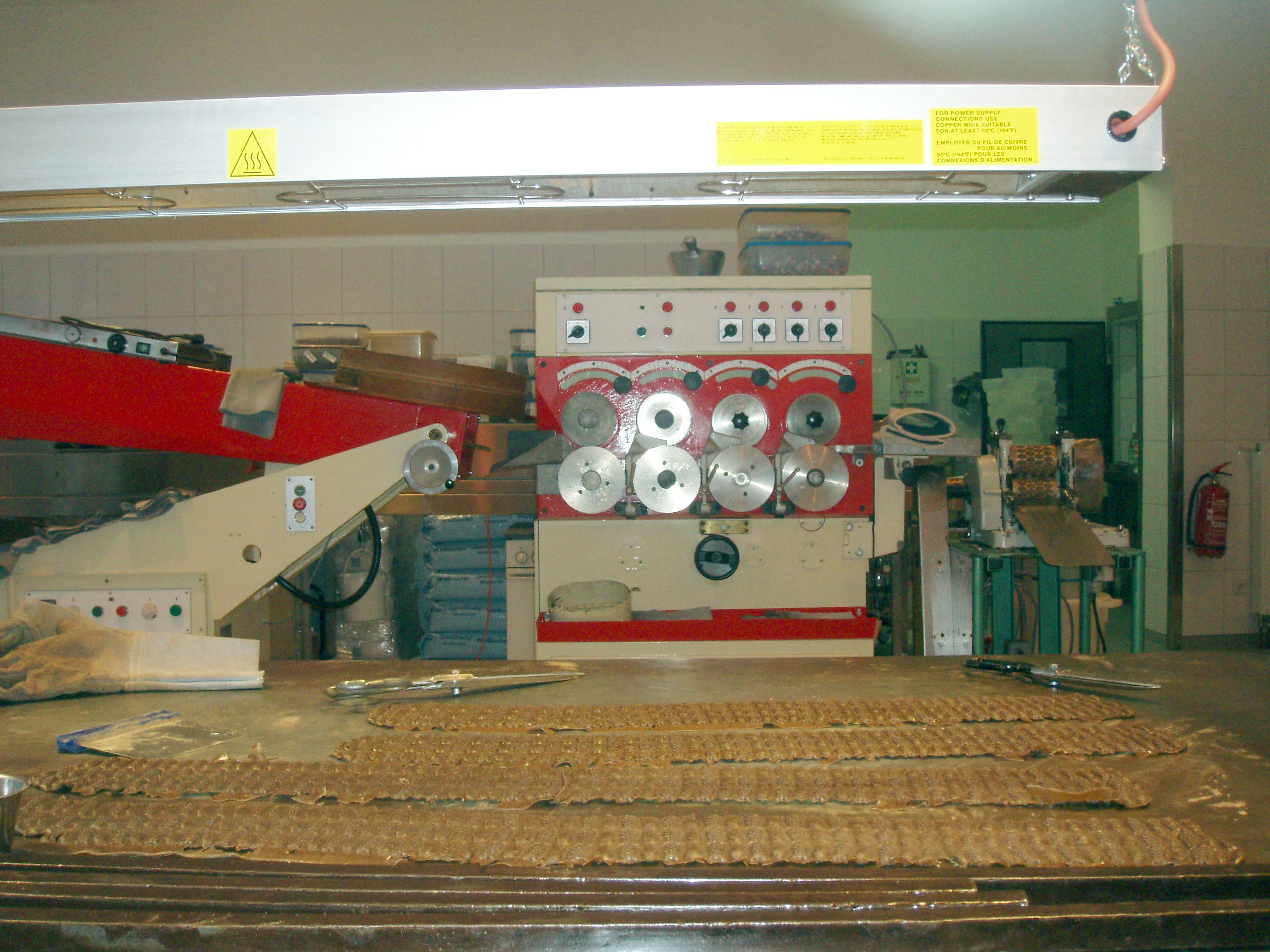 Bonbonherstellung